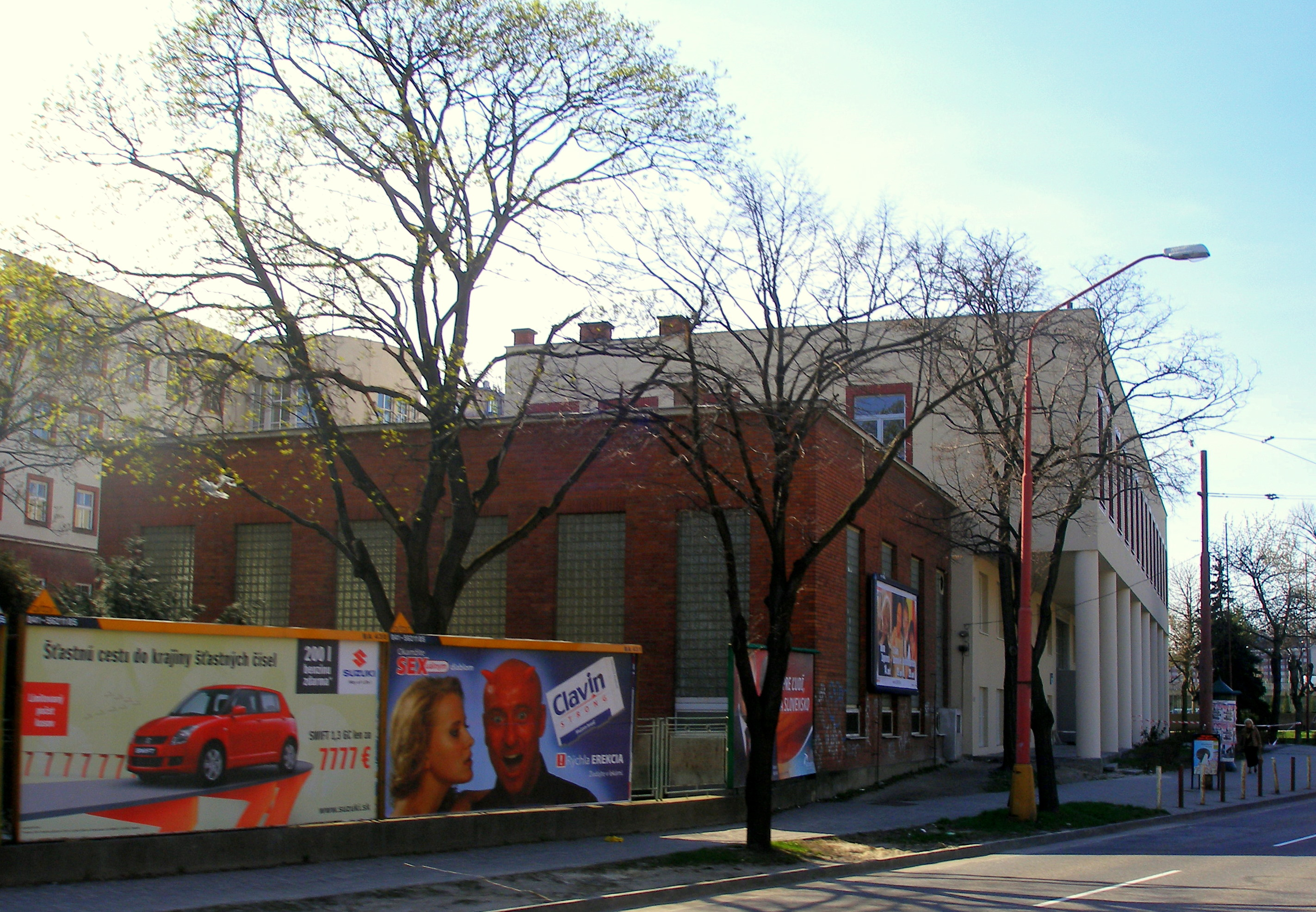 Bratislava Dvořákovo nábrežie. Vysokoškolský areál Lafranconi.